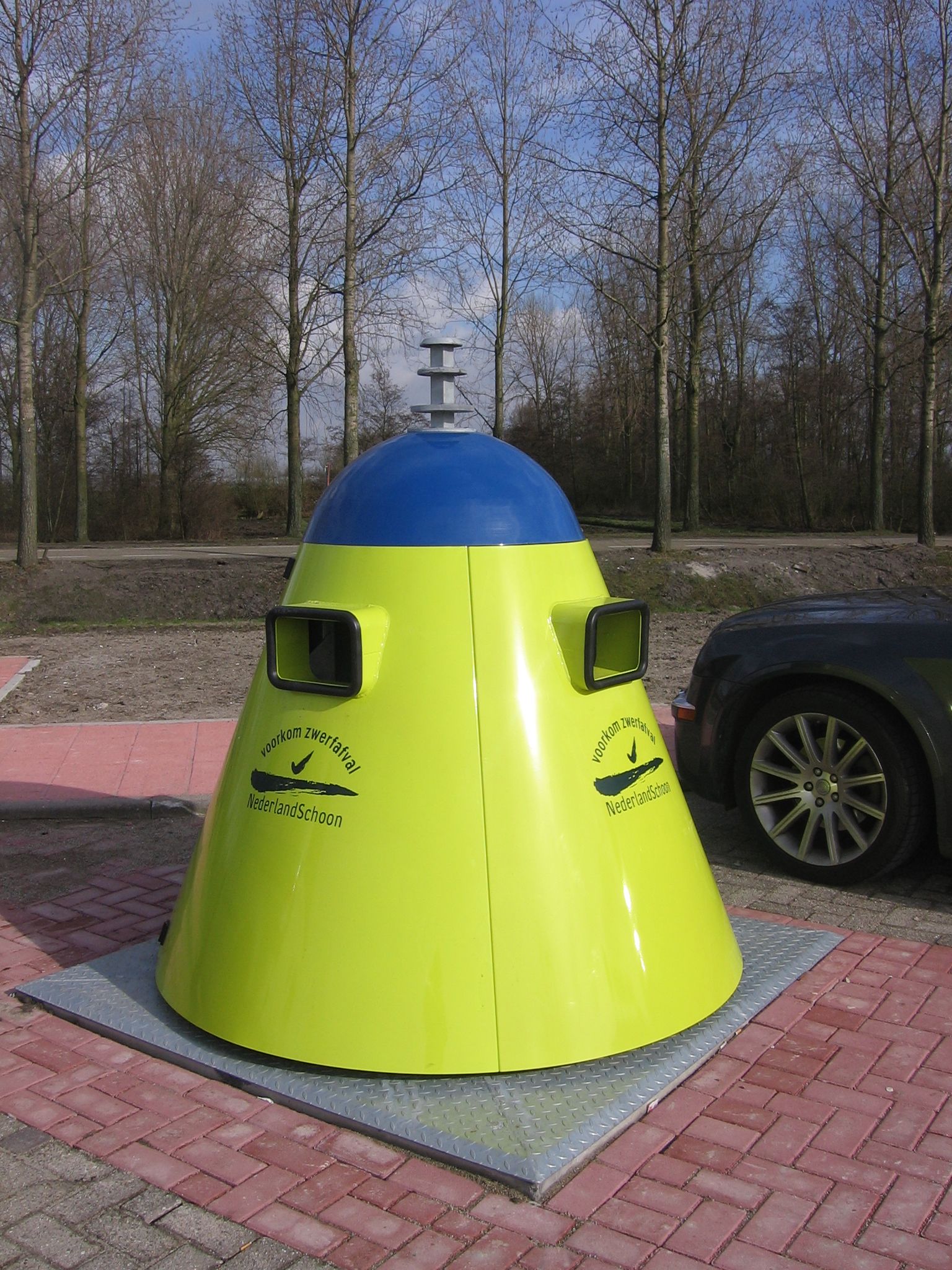 Rijkswaterstaat heeft een nieuw type afvalbak ontwikkeld.